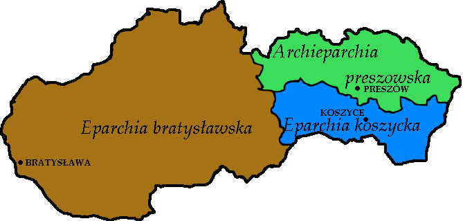 Struktury Pravoslavné církve v Českých zemích a na Slovensku - na Slovensku s polskými popisy